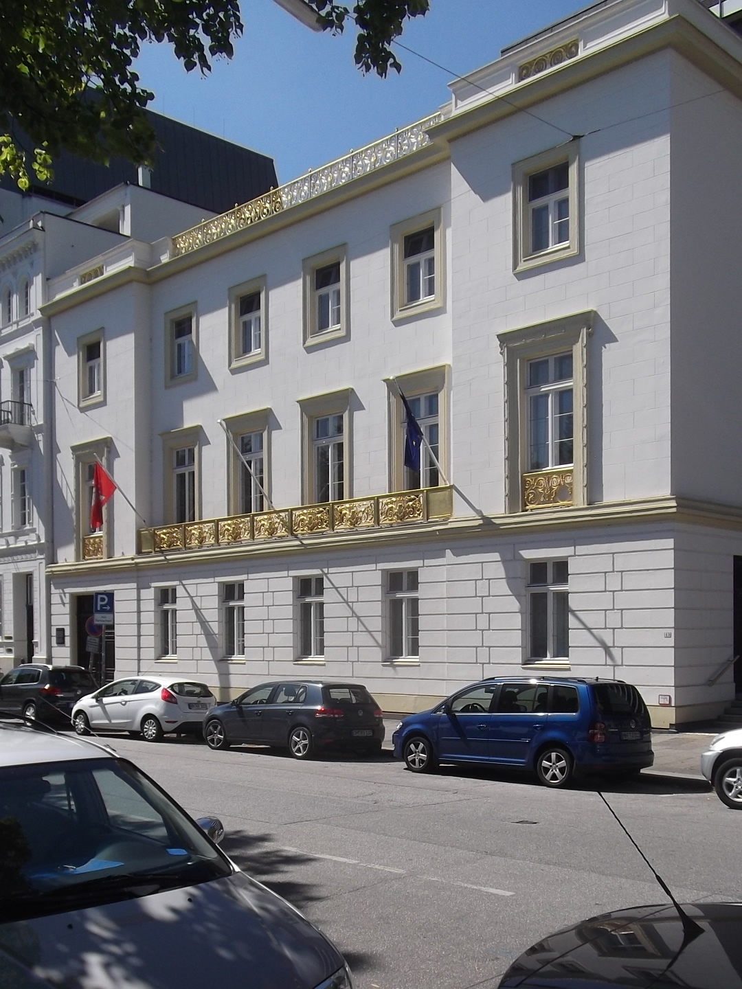 Hamburg Neuer Jungfernstieg